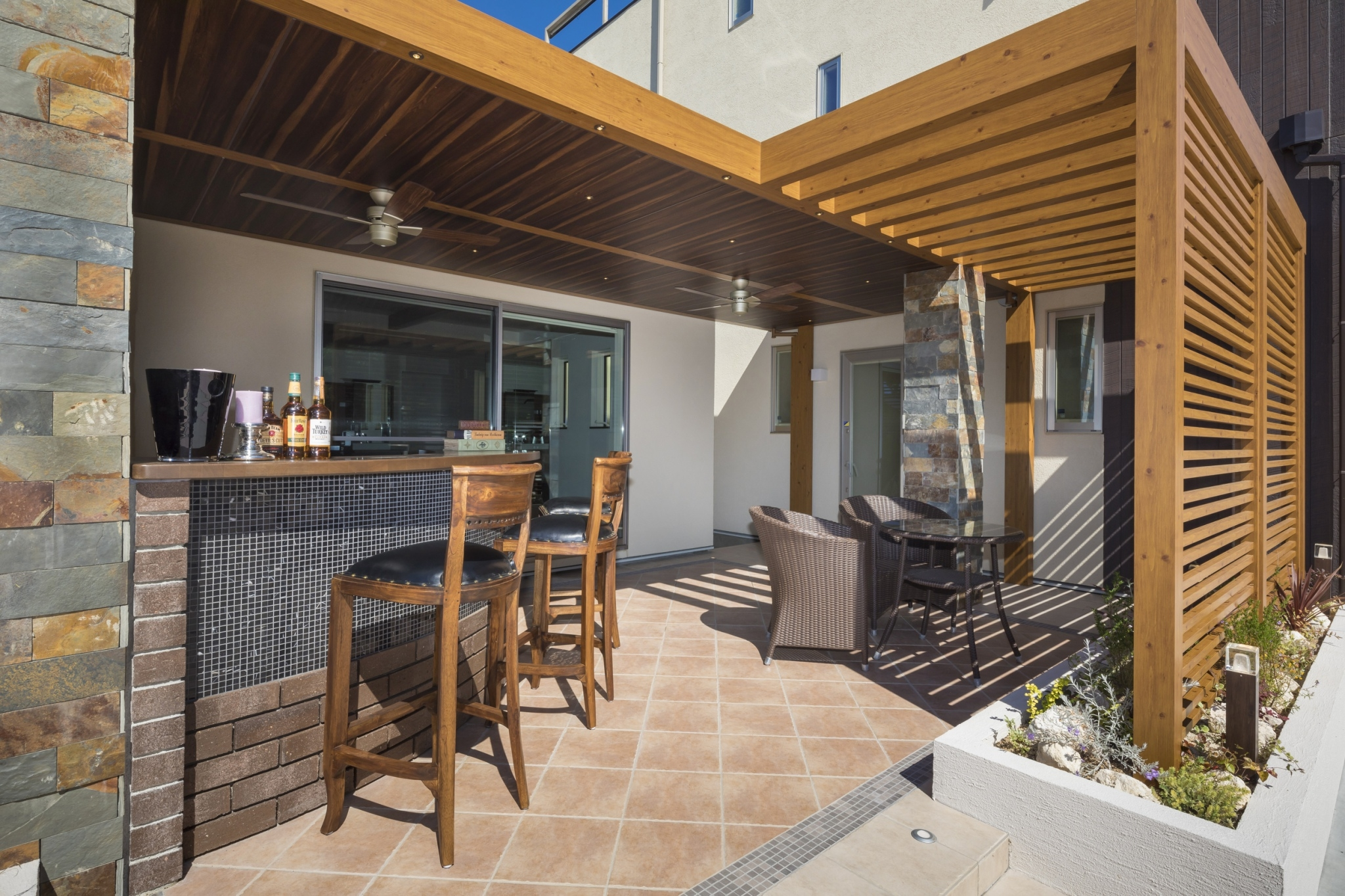 Outdoor living アウトドアリビング設置例 contractor.： Himawari Life Co., Ltd.（ひまわりライフ）